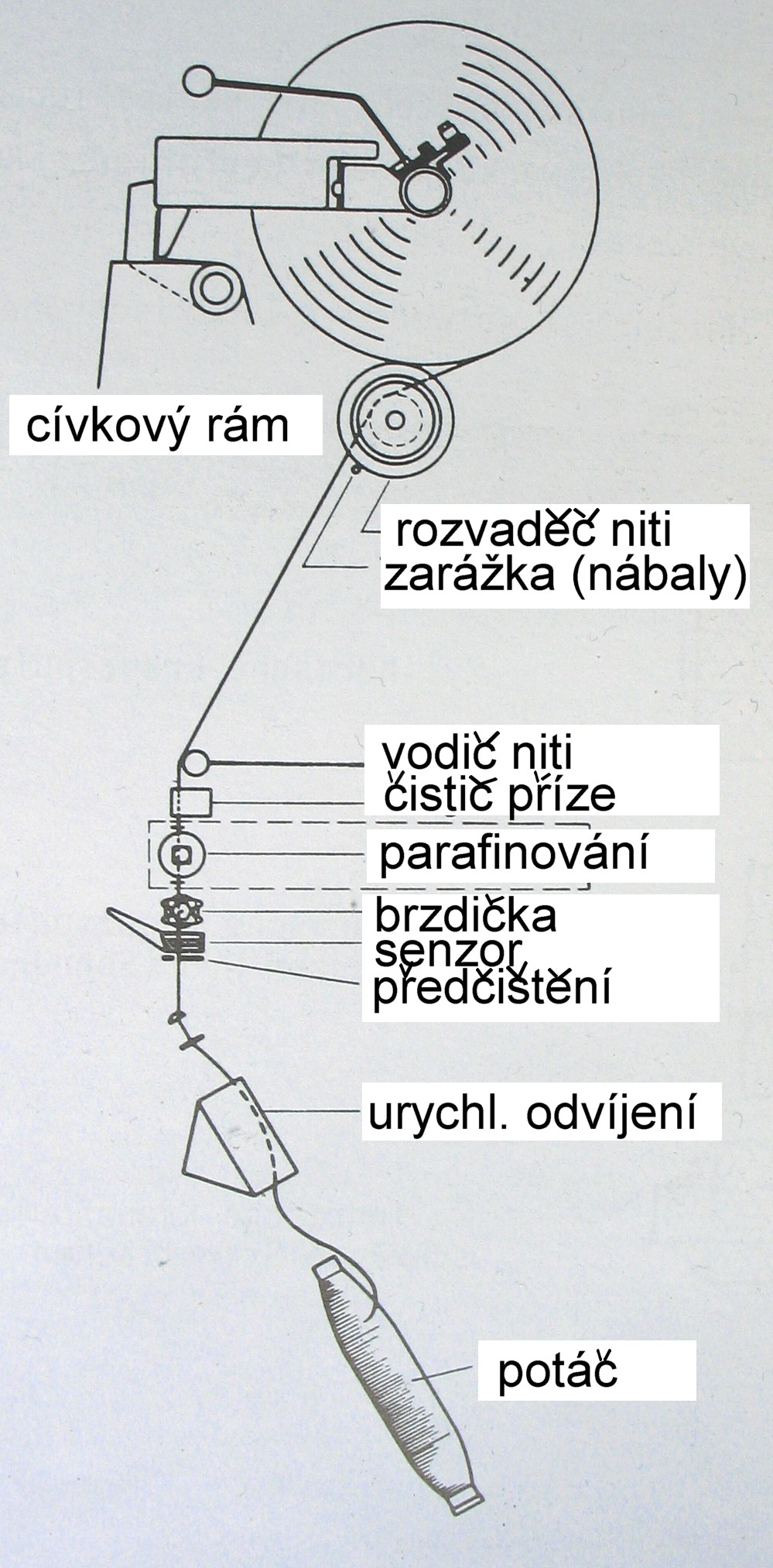 Schema: Fadenlauf einer Spulstelle